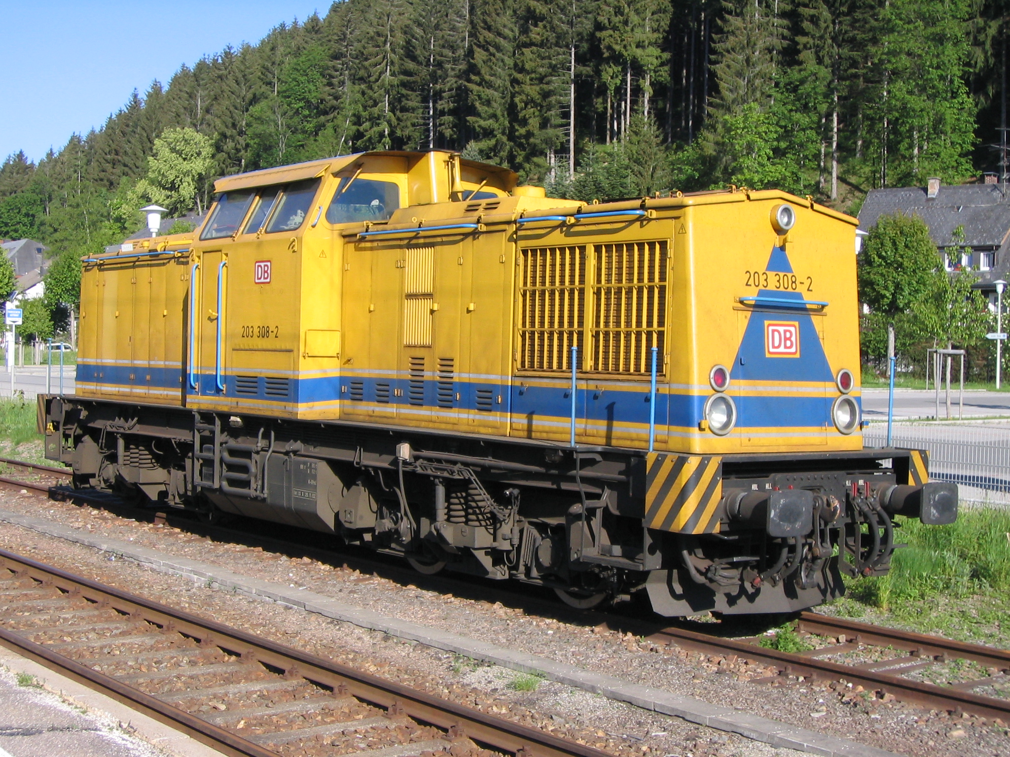 Diesellokomotive 203 308-2 in Titisee, Baden-Württemberg, Deutschland